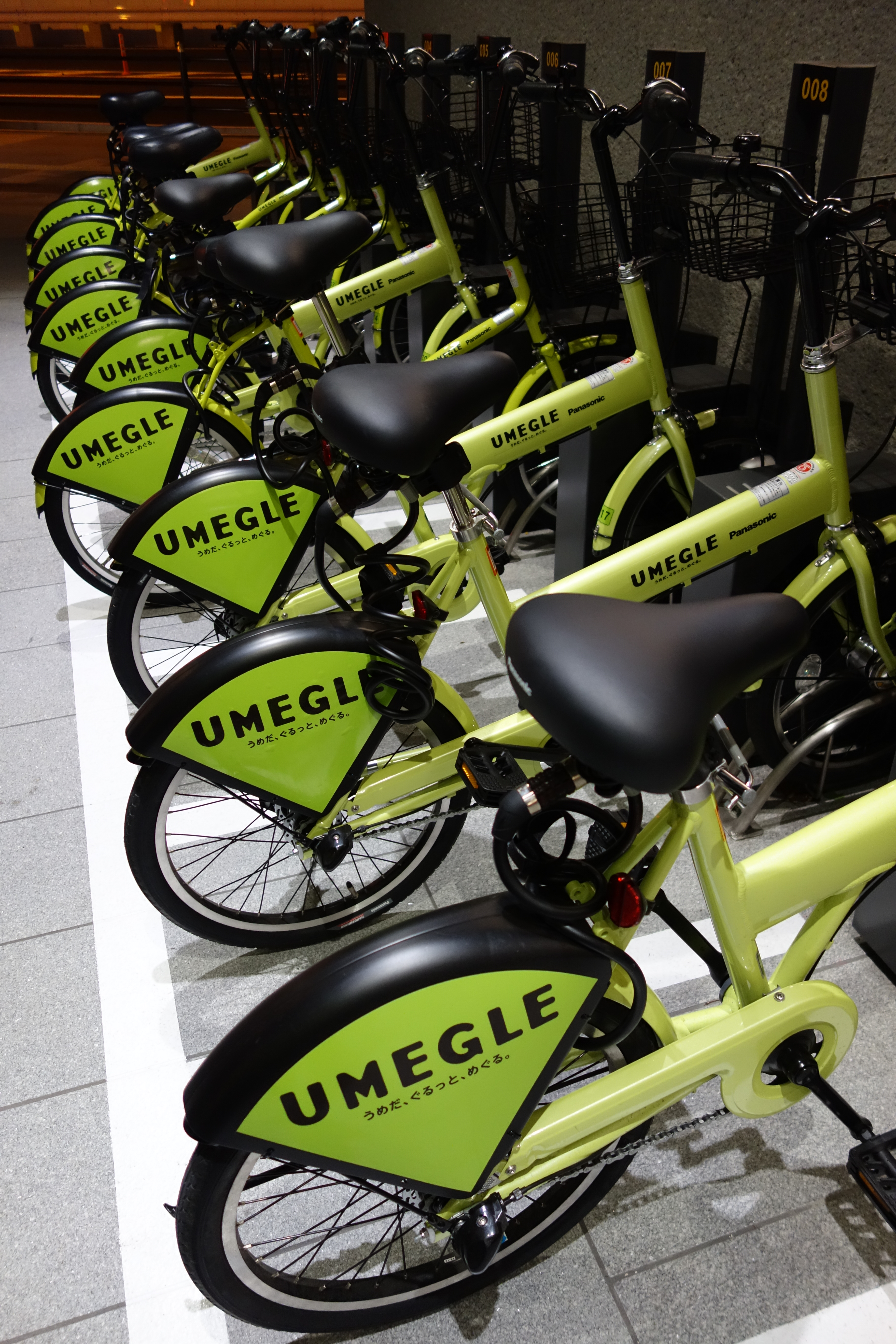 UMEGLE-CHARI（うめぐるチャリ） （大阪市北区・グランフロント大阪） 貸出は貸出機で行われるため、借主が特定できるPiTaPa、クレジットカードでの支払いのみ （ICOCA・Suicaなど相互利用ICカードや、現金での支払は不可）